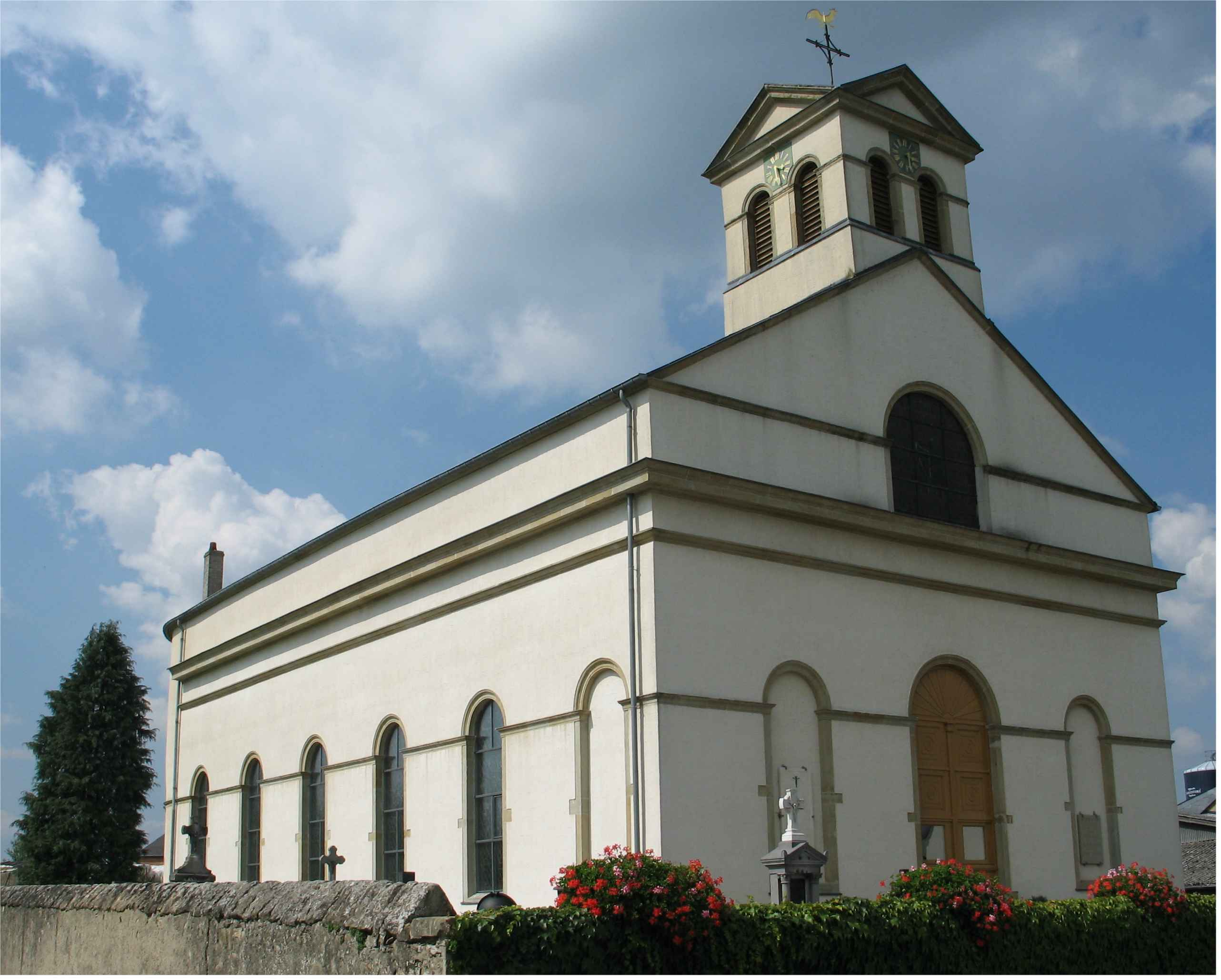 Kierch vun Ouljen Ouljen Kierch Ouljen